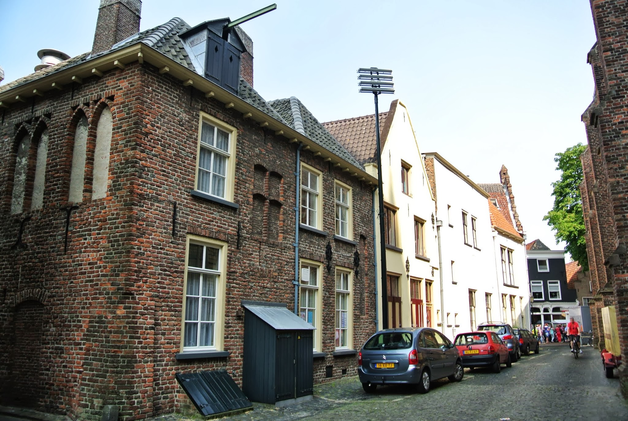 Doesburg, Netherlands